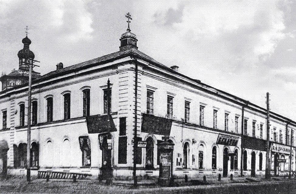 Здание Казанской духовной семинарии